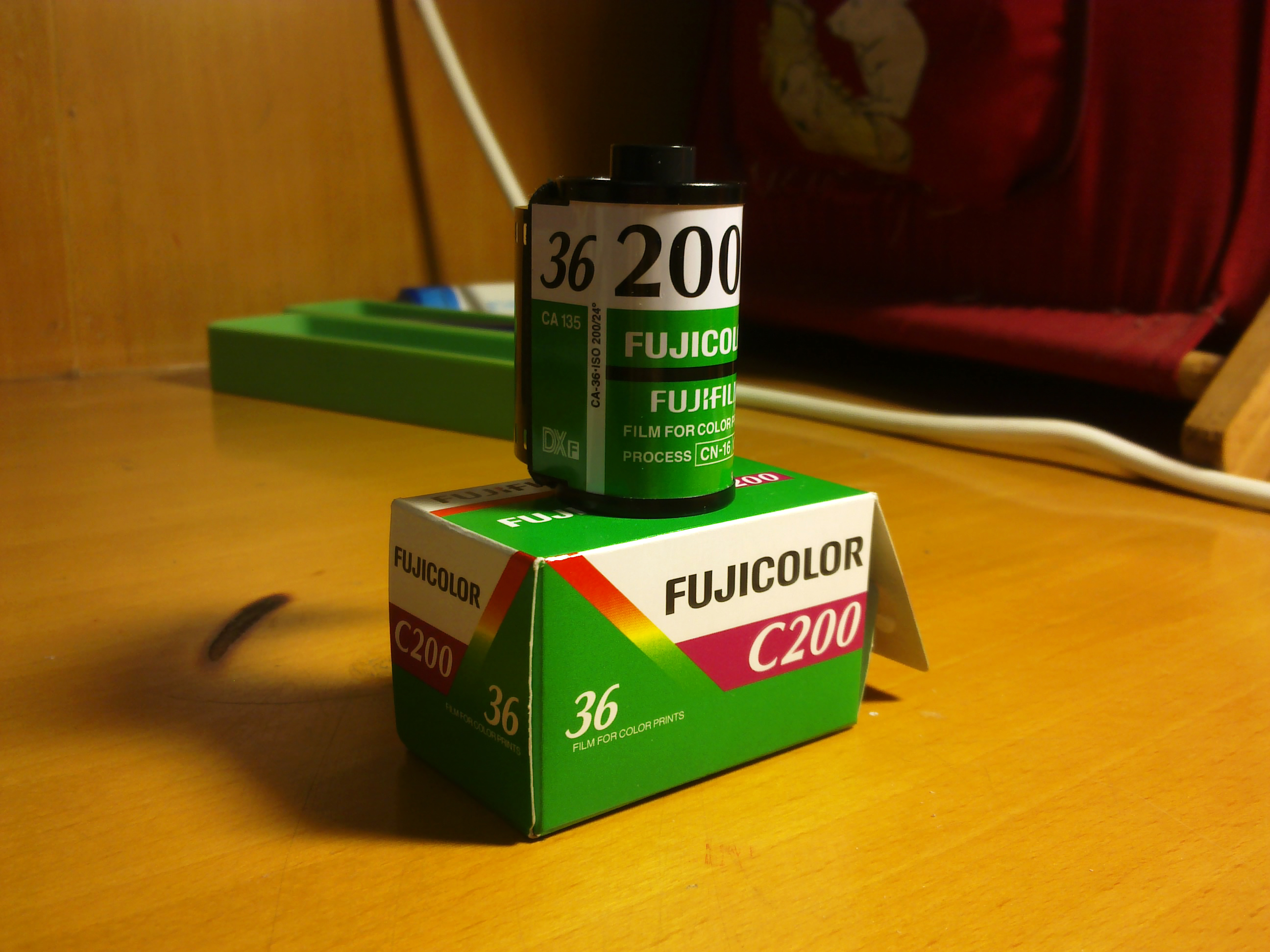 这是富士胶片为替代SUPERIA 200而生产的FUJICOLOR C200，面向民用低端市场，感光度为ISO 200。盒上注明此胶卷由立陶宛和波兰的富士胶片分公司发行，但在其他国家亦有贩售。